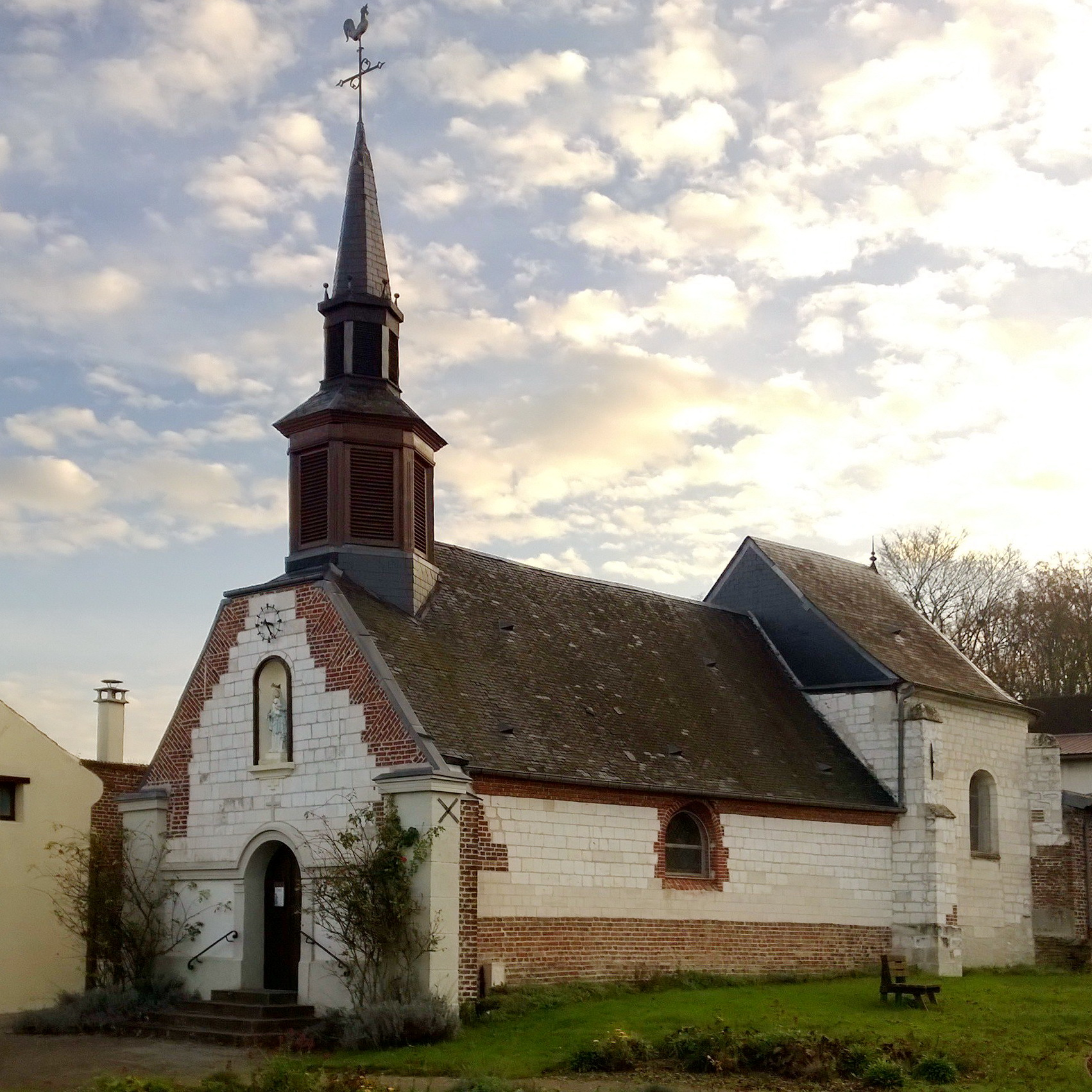 Chapelle Notre-Dame des Vertus de Nampty